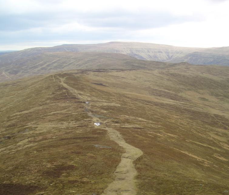 PEN TWYN GLAS